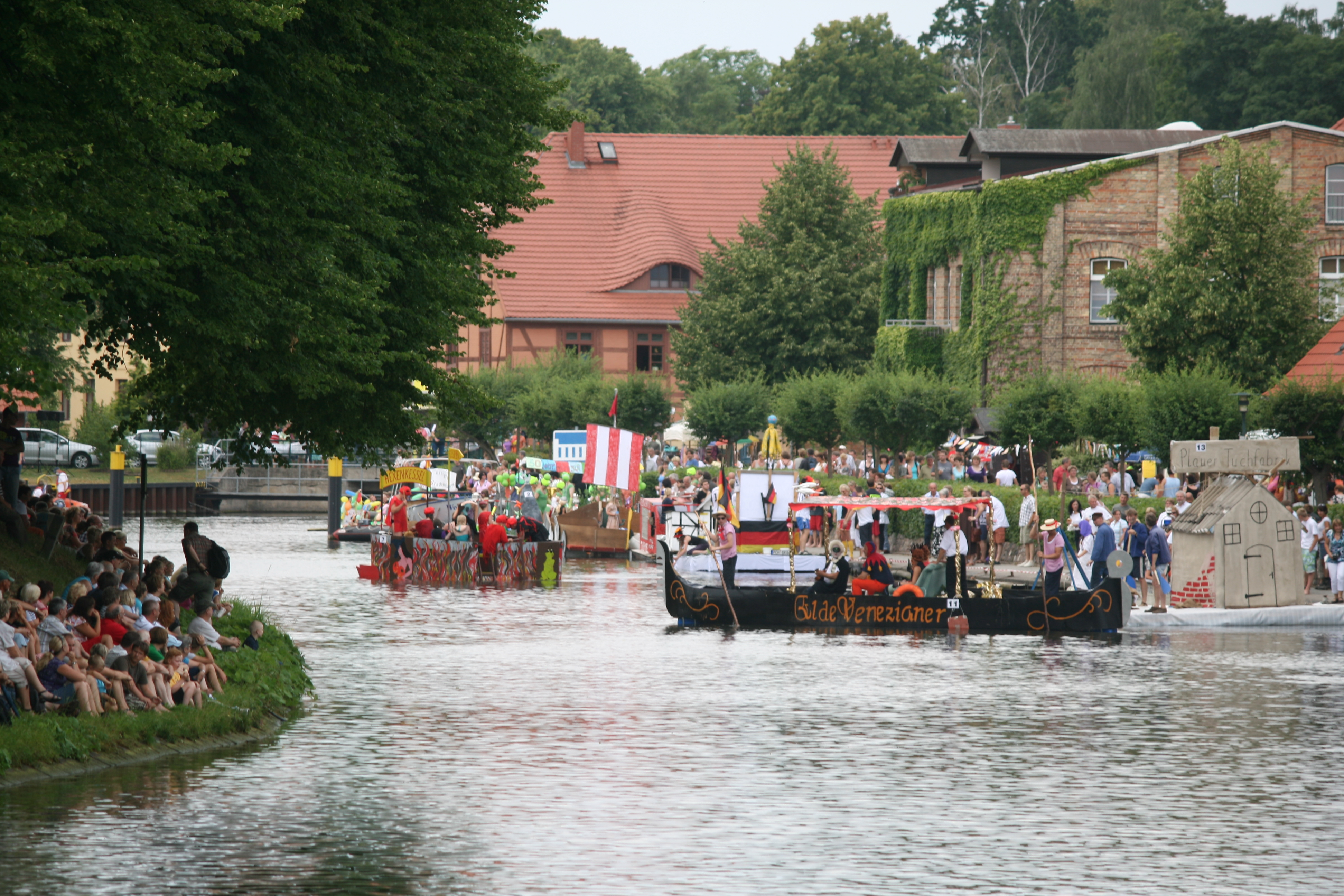 Badewannenrallye in Plau am See, Mecklenburg-Vorpommern